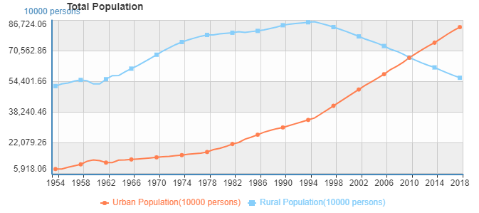 Соотношение городского и сельского населения Китая 1954-2018